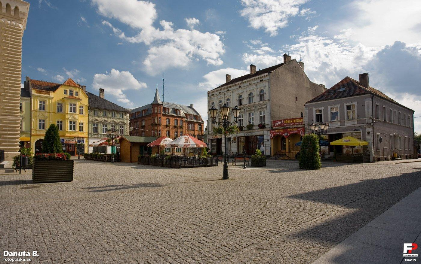 Świebodziński rynek ożywił się, pojawił się ogródek; można już przysiąść i wypić piwo. Elewacje ratusza odnowiono, widać jego fragment z lewej strony.